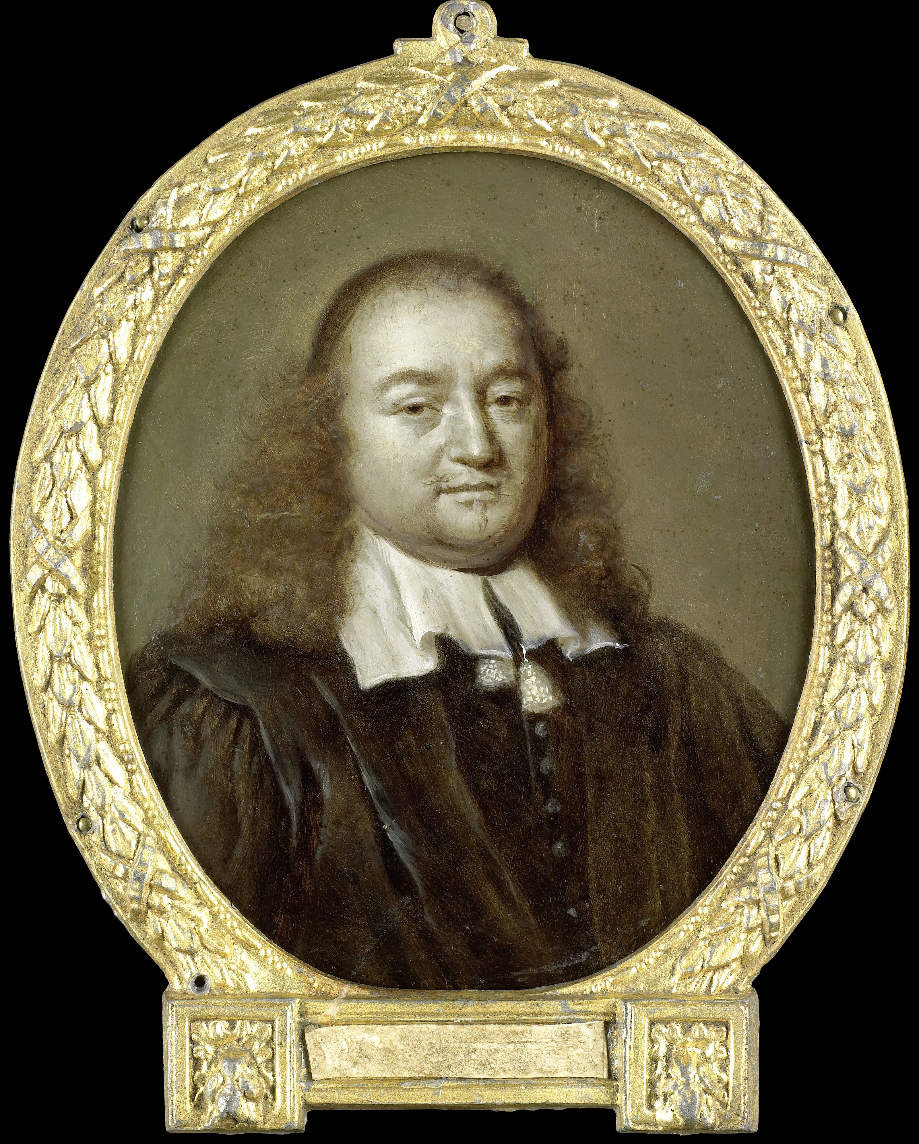 IdentificatieTitel(s): Johannes Fredericus Gronovius (1611-71). Filoloog en jurist, hoogleraar te LeidenObjecttype: schilderij grisaille Objectnummer: SK-A-4575Opschriften / Merken: inscriptie, achterzijde: ‘Joh. Fred.r Gronovius. 1611’Omschrijving: Portret van Johan Frederik Gronovius (1611-71). Filoloog en jurist, hoogleraar te Leiden. Buste in ovaal, naar rechts. Onderdeel van een verzameling portretten van Nederlandse dichters.VervaardigingVervaardiger: schilder: Jan Maurits Quinkhardprentmaker: Johannes Willemsz. Munnickhuysen (kopie naar)Datering: 1732 - 1771Fysieke kenmerken: olieverf op koperMateriaal: koper olieverf Techniek: grisailleAfmetingen: drager: h 11 cm. × b 9,5 cm. paneel: h 41,2 cm. × b 47,4 cm. × d 1,6 cm. OnderwerpWat: portrait of a writerwriter, poet, authorWie: Johann Friedrich GronoviusVerwerving en rechtenVerwerving: aankoop 1877Copyright: Publiek domein